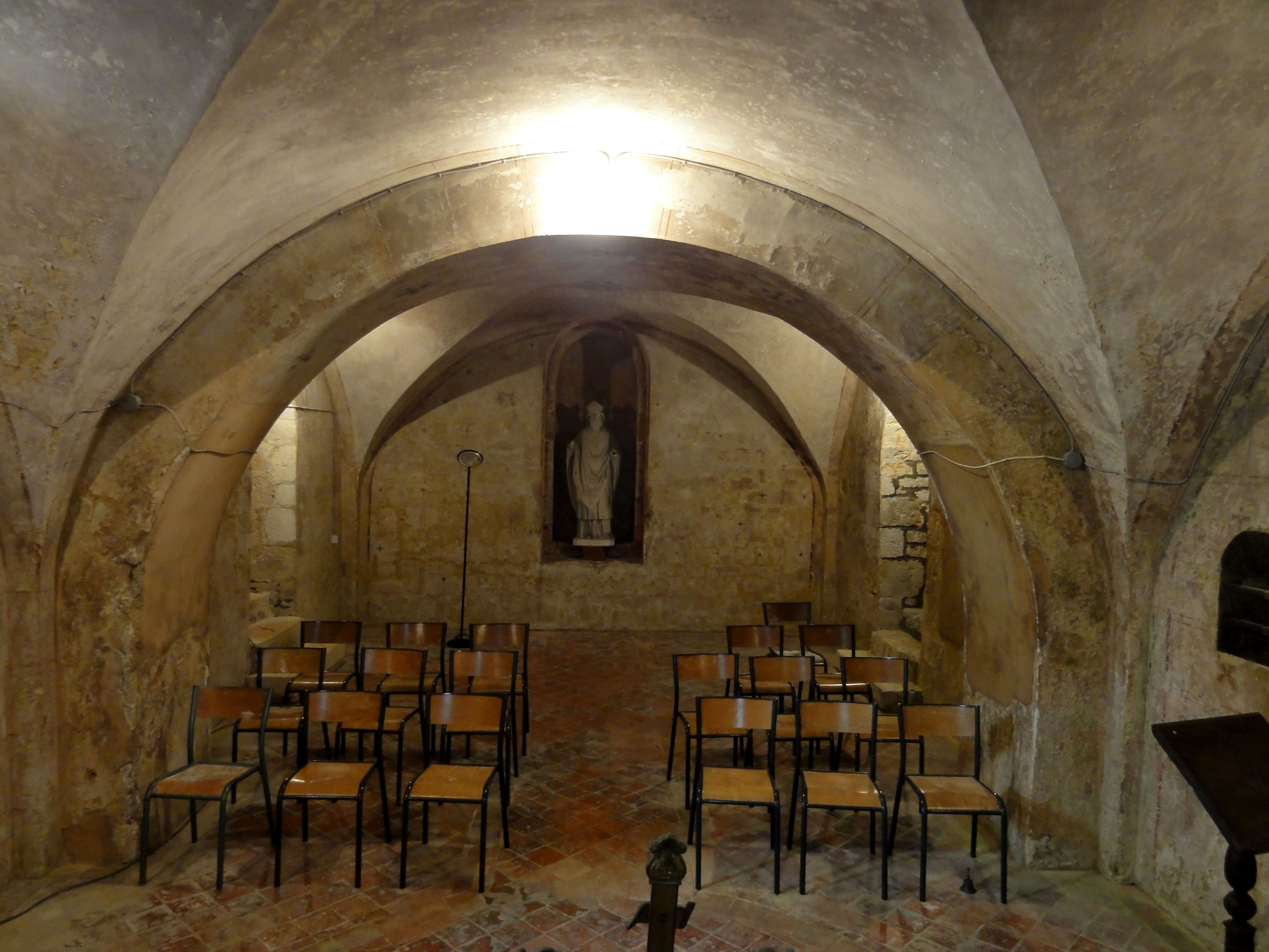 Voir titre du fichier.